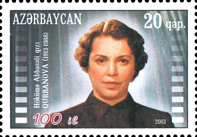 N 1087 - 20 qapik. The stamp dedicated to the 100th Ann. of the outstanding Azerbaijan actress Hokuma Gurbanova.